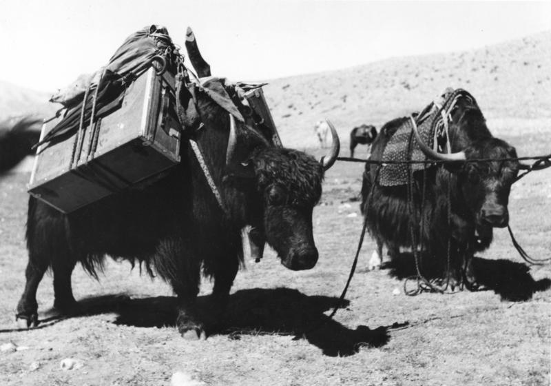 Tibetexpedition, Beladene Jaks Gayokang-Gayamtsona [Gyamtsona]-See, Beladen der Karawane [Yaks, Jaks]